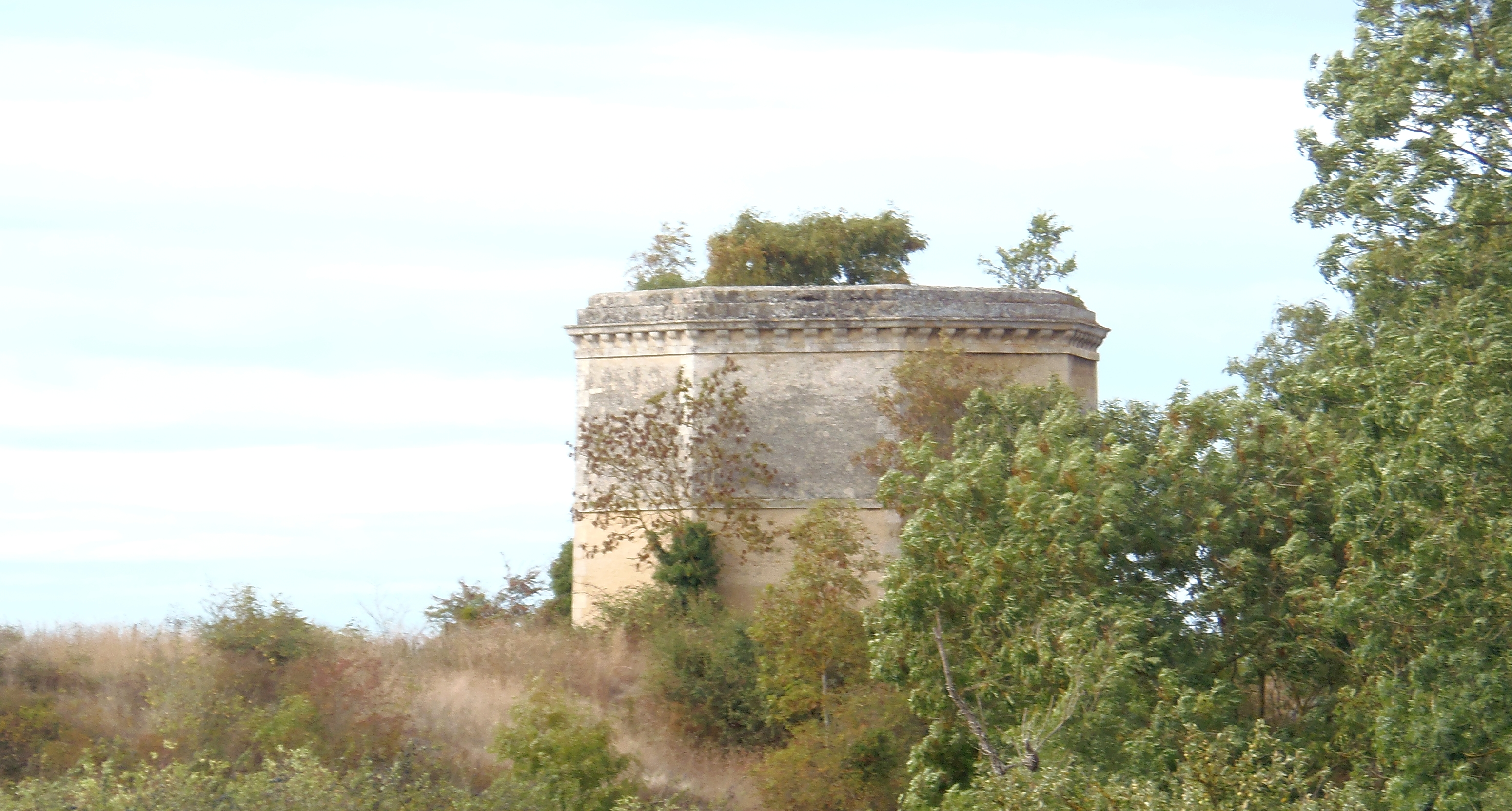 Sassy (Normandie, France). Colombier du manoir du Châtelet.